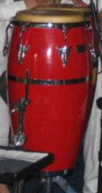 eigen conga foto